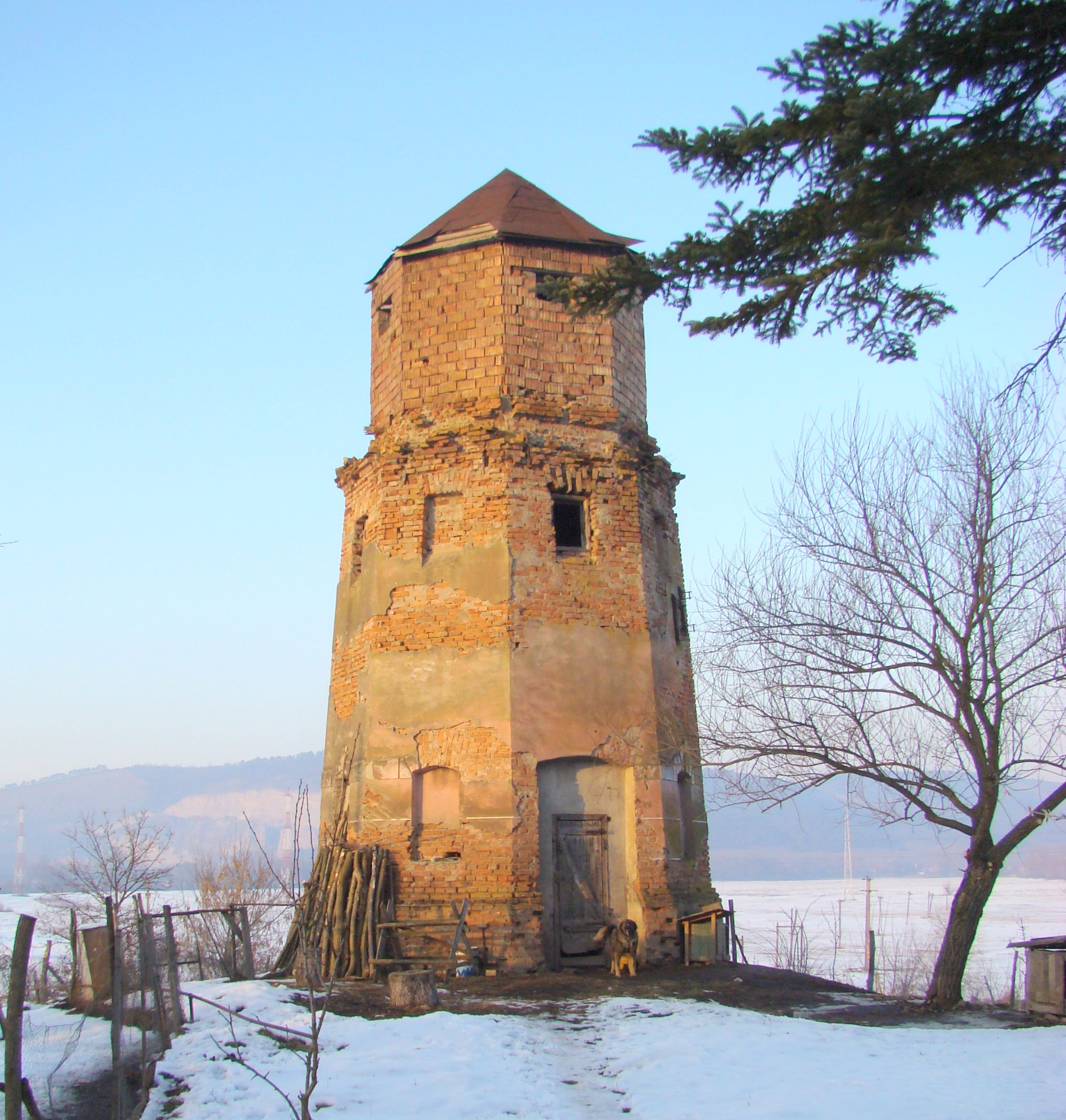 Castelul Degenfeld din satul Cuci, comuna Cuci, judeţul Mureş